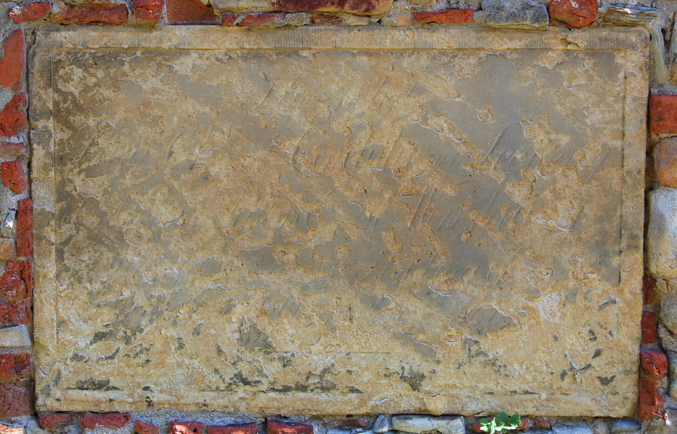 Grabplatte an der Westmauer des Turms des St. Stephanus Kirche in Magdeburg-Westerhüsen